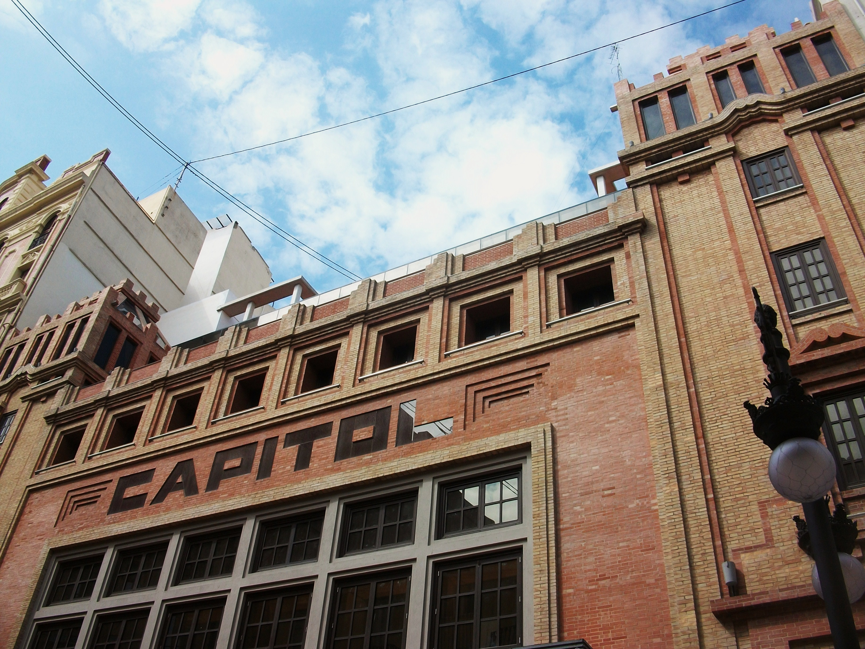 Antic cine Capitol de València, al carrer Ribera. De l'arquitecte Joaquín Rieta Síster, 1930.